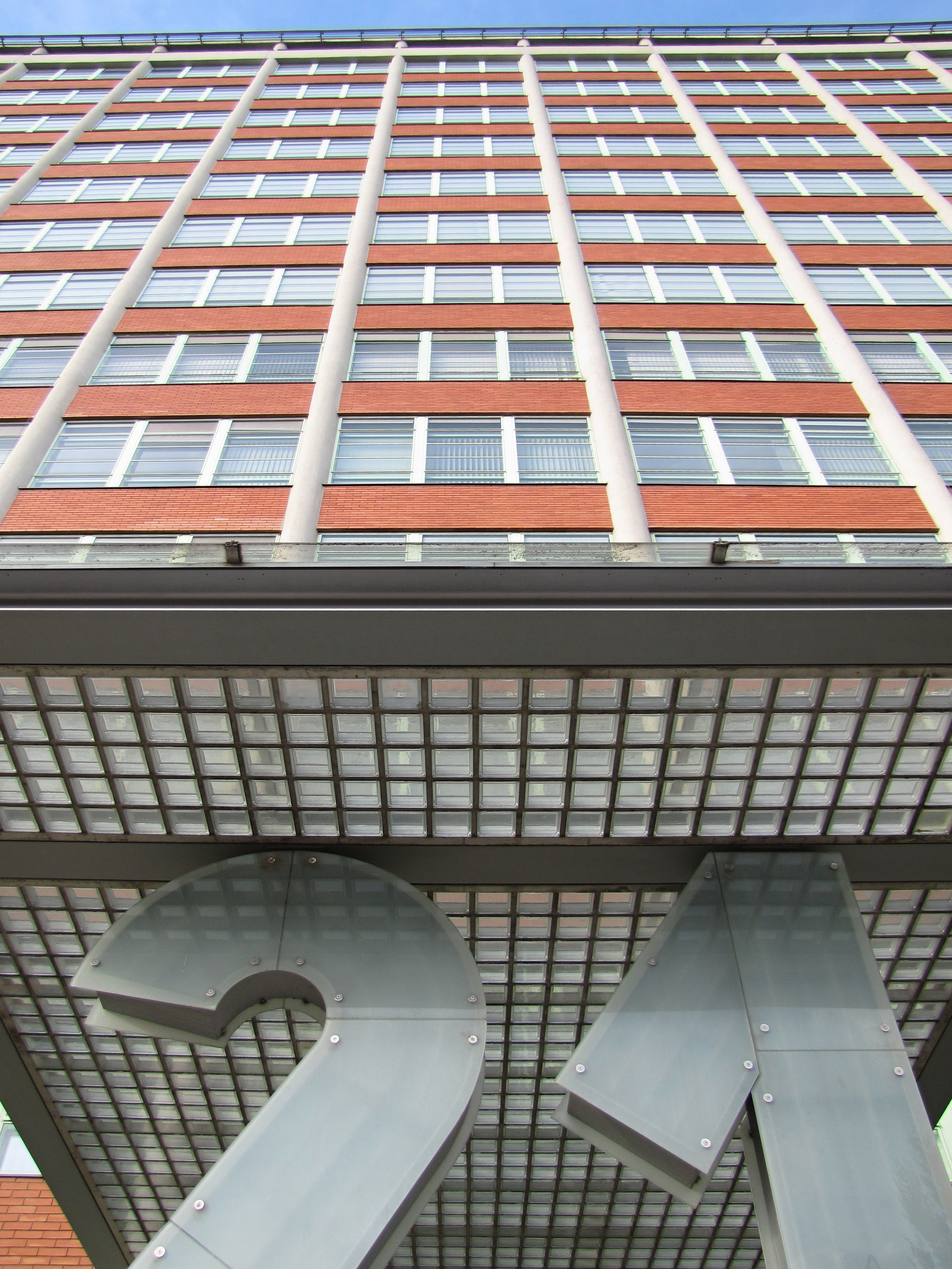 Baťův mrakodrap ve Zlíně